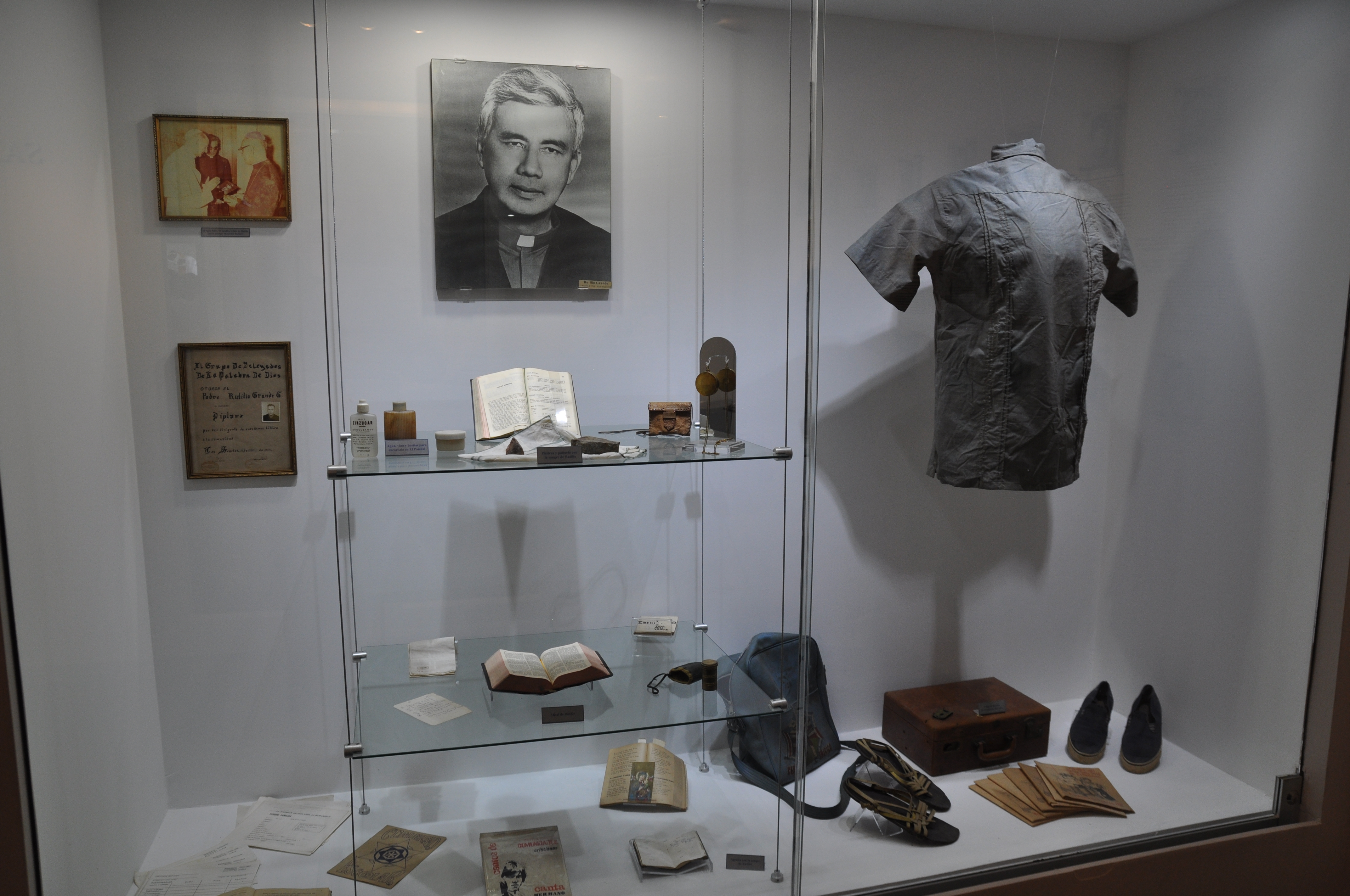 Mártir Rutilio Grande - Vitrina Sala de Mártires - UCA - El Salvador.